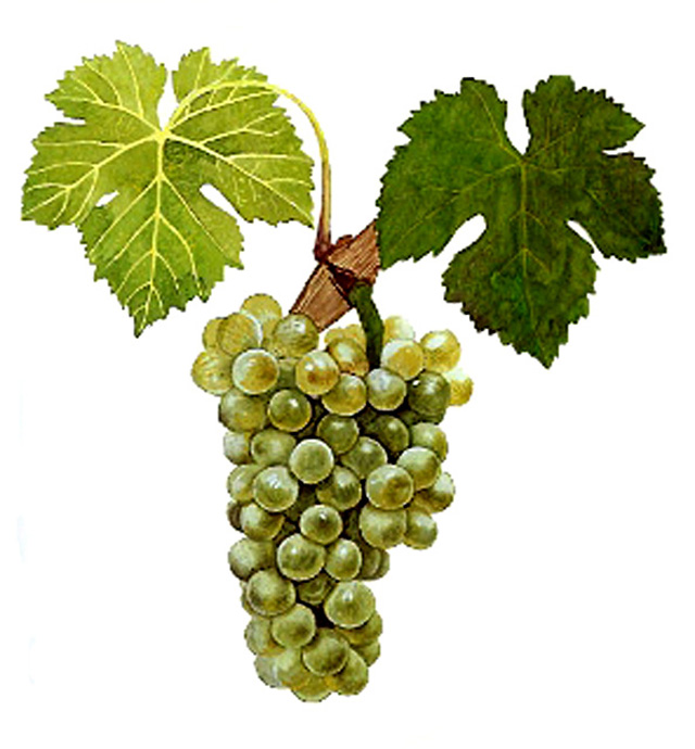 Grappe de Viognier par Viala et Vermorel